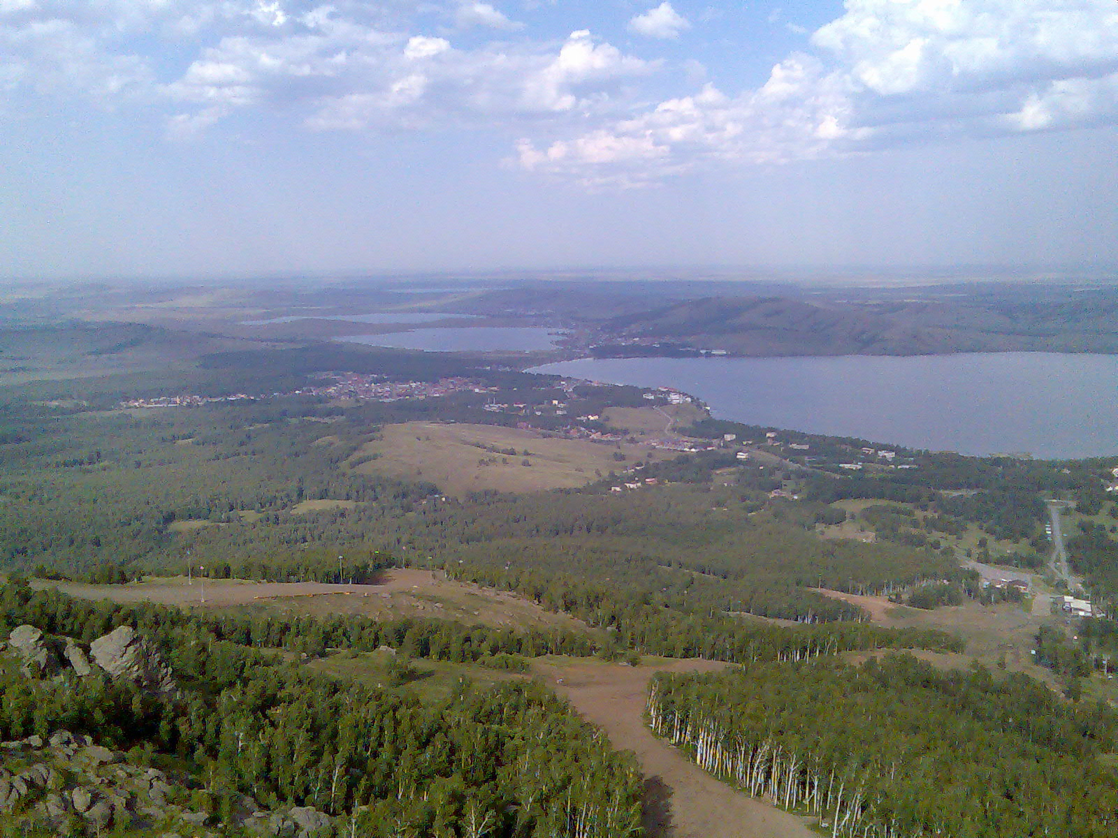 Яктыкуль (Банное озеро)